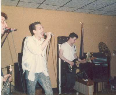 Naked Raygun playing